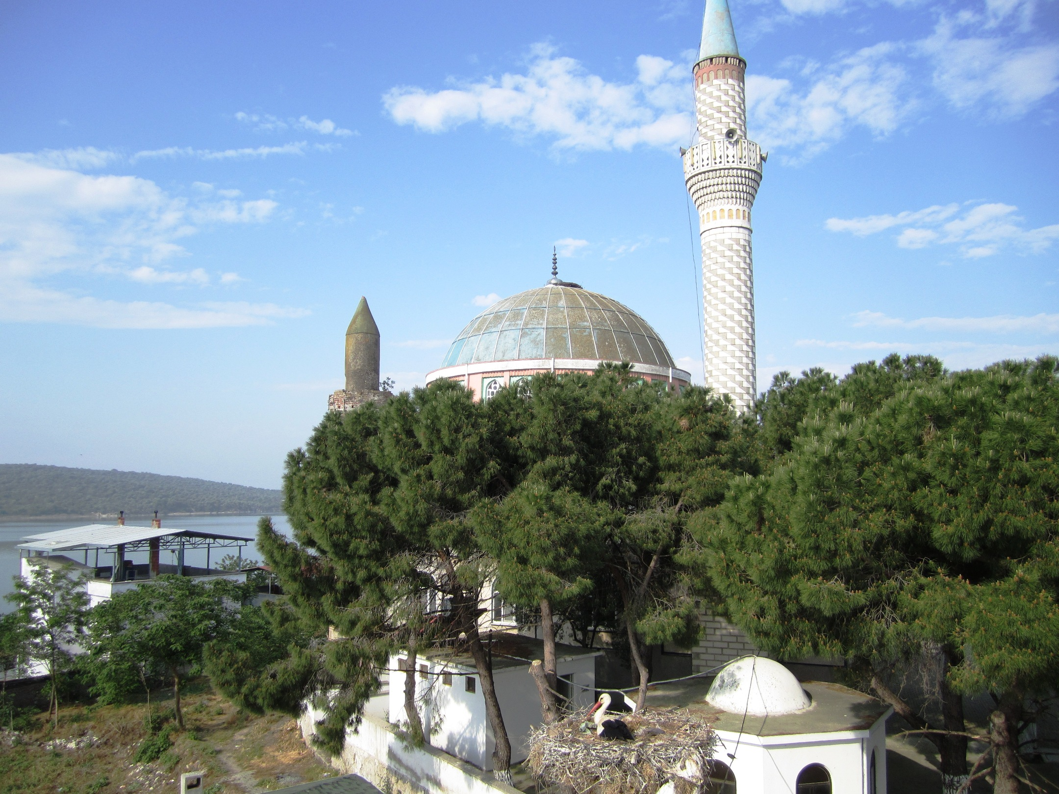 Ein Klapperstorch, die Moschee und der Ulubat Gölü von Eskikaraagac